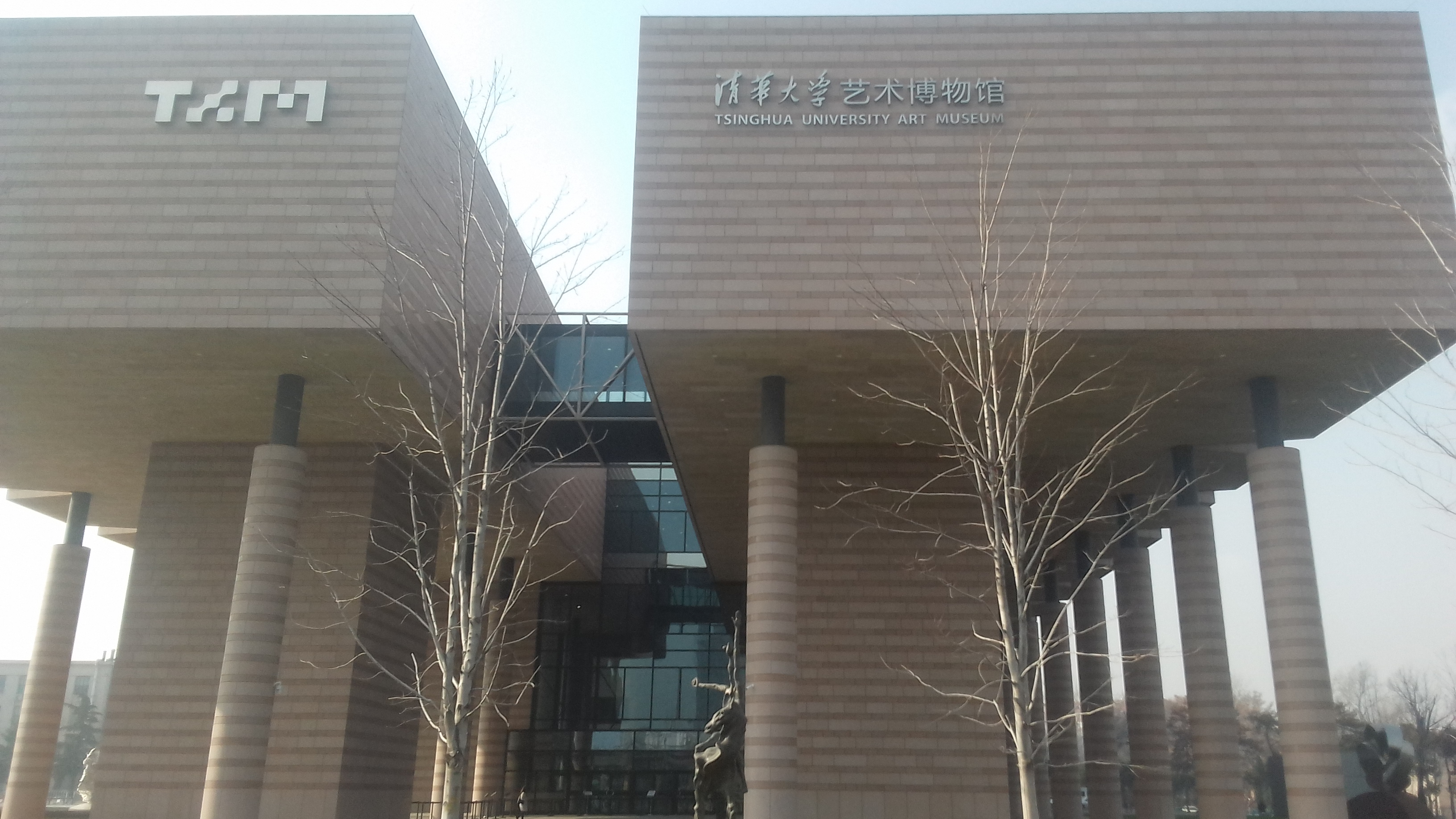 博物館正面